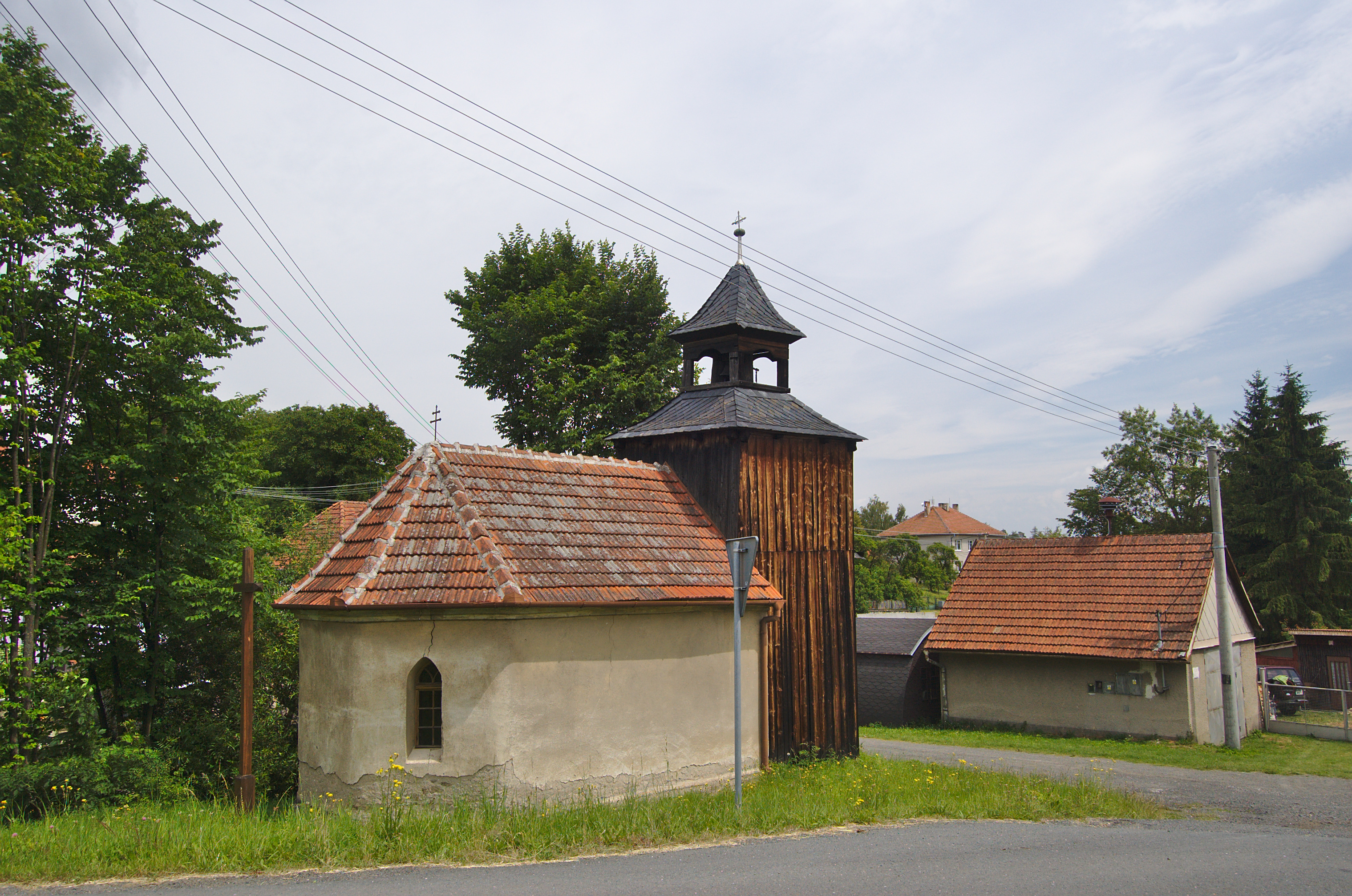 Kaplička se zvonicí, Runářov, okres Prostějov